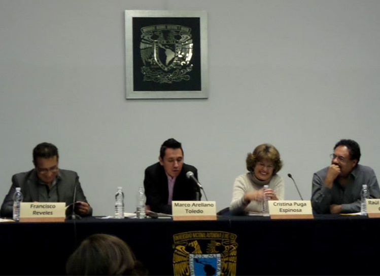 Marco Arellano Toledo